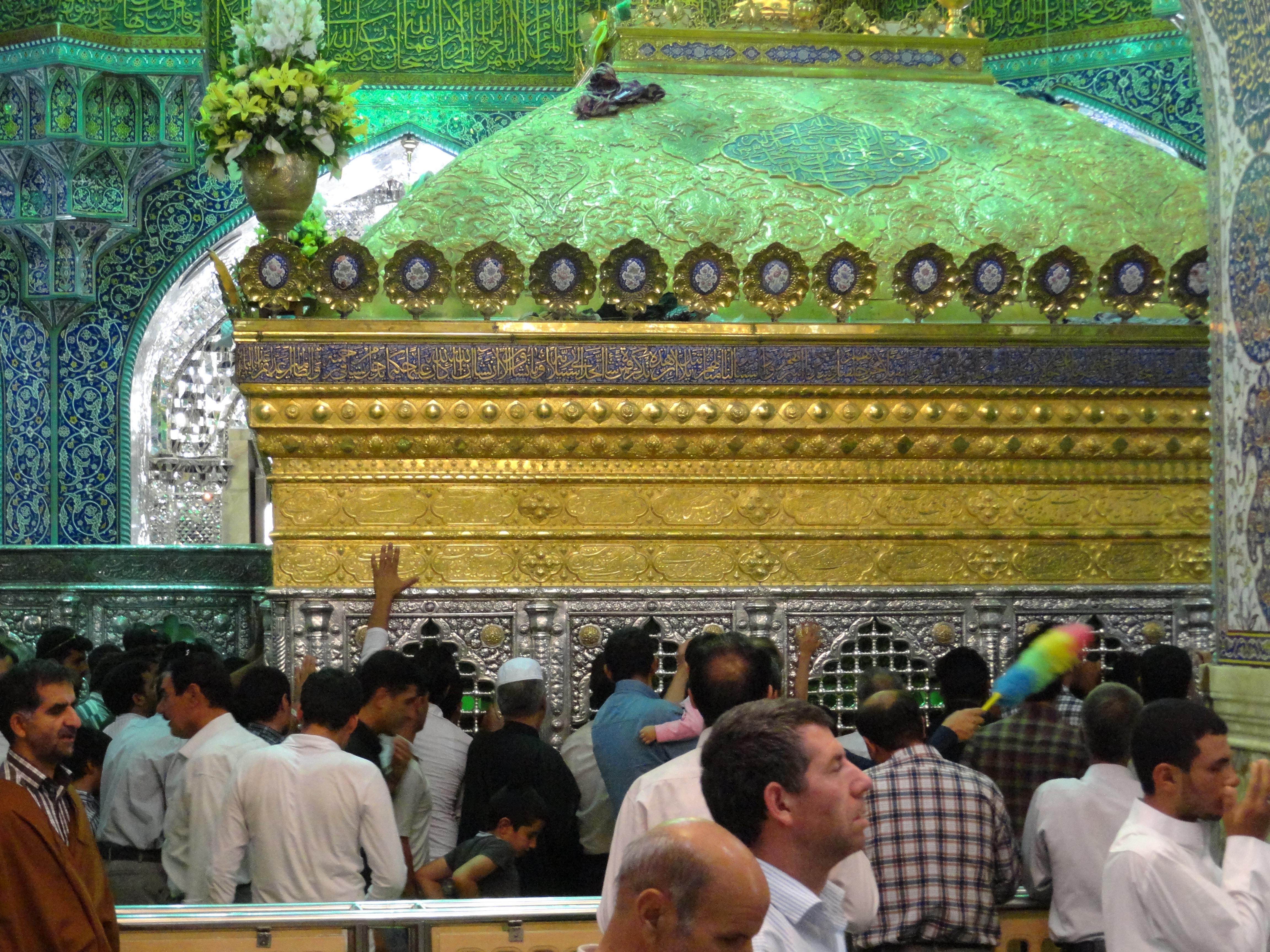 ضریح حضرت معصومه